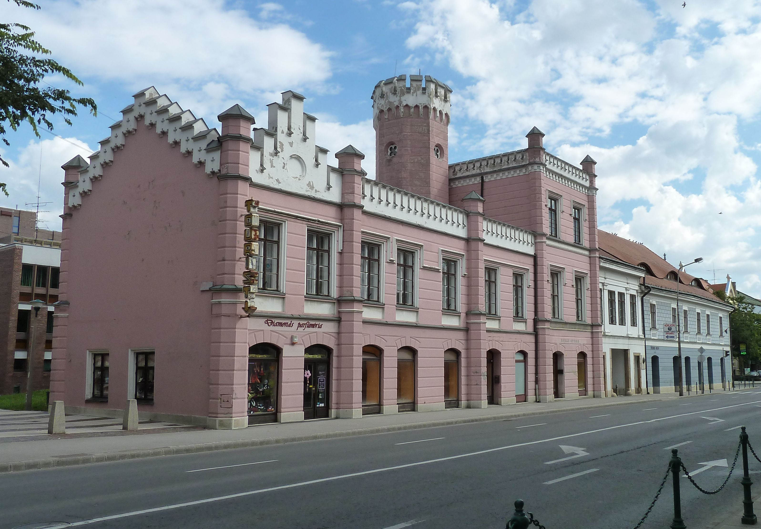 Az Augusz-ház Ezen a helyen állott a Fekete Elefánt fogadó, melyben többek között II. József király is több napig vendégeskedett 1789-ben. - Az épület legrégebbi része a jelenleg kékesszürkére festett déli szárny, amely az 1820-as években épült. Építtetője idősebb Augusz Antal volt, a későbbi báró apja. - A középső rész (jelenleg fehér) a Vármegyeháza klasszicista stílusát idézi, építési ideje is az 1830-as évekre tehető. - A legújabb északi szárny a Triest melletti Miramare kastély mintájára épült, 1870-ben készült el, építtetője báró Augusz Antal, tervezője és kivitelezője a svájci származású Stann Jakab volt.